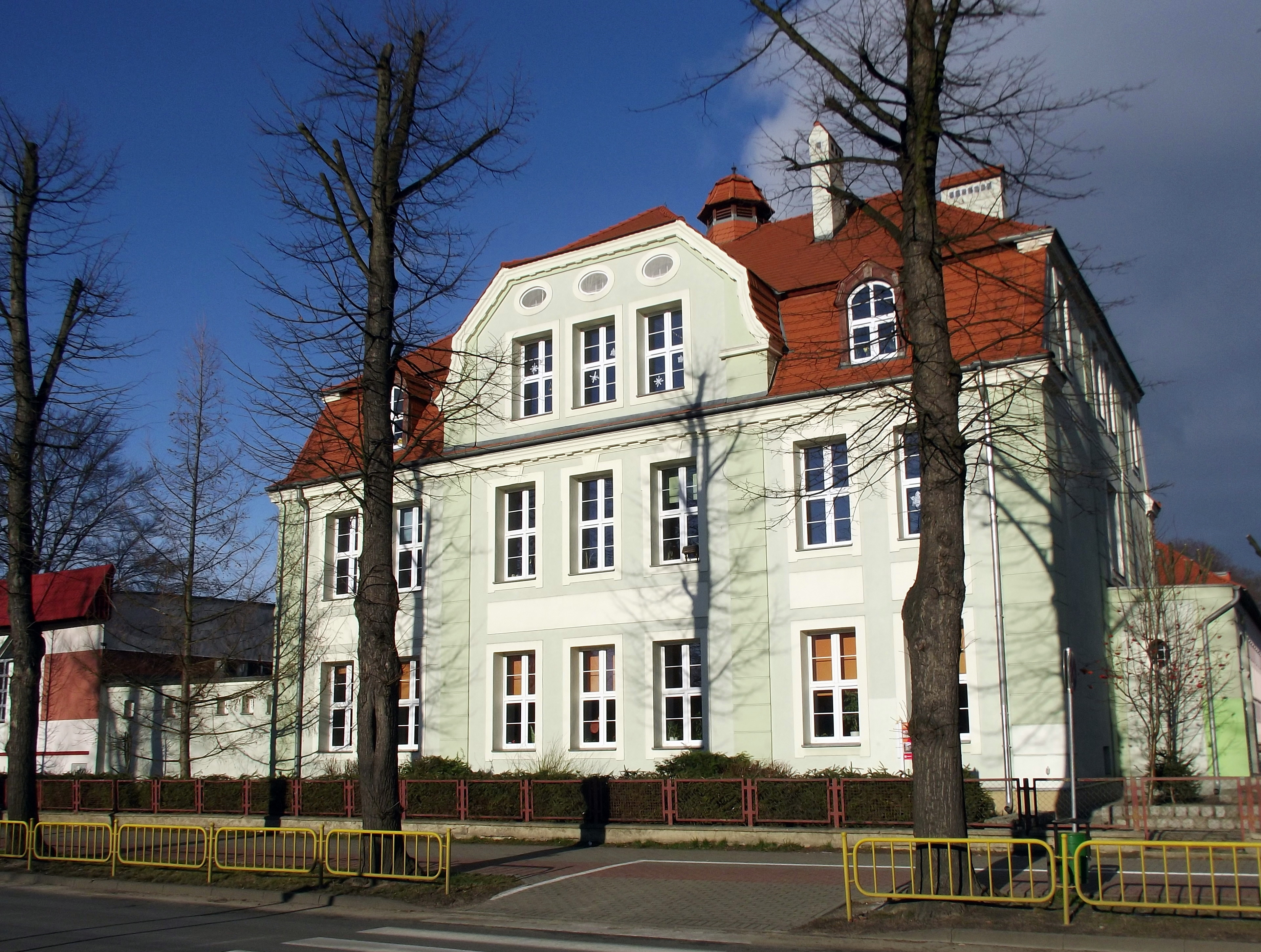 Międzyrzecz, ul. Staszica 9 - budynek szkoły podstawowej nr 2, projekt Zillmannów